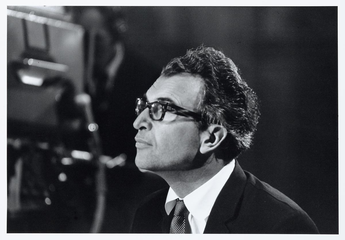 Jazz concert met Dave Brubeck in Concertgebouw, 10 oktober 1964 Foto Ben van Meerendonk / AHF, collectie IISG, Amsterdam